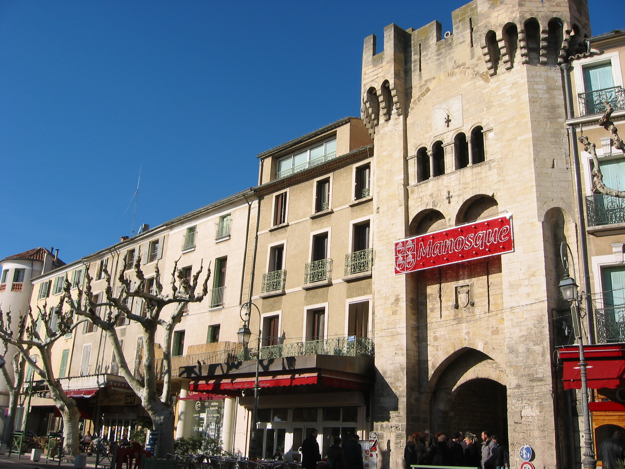 Porte Saunerie (porte du sel) (1382) , Manosque, Provence, France